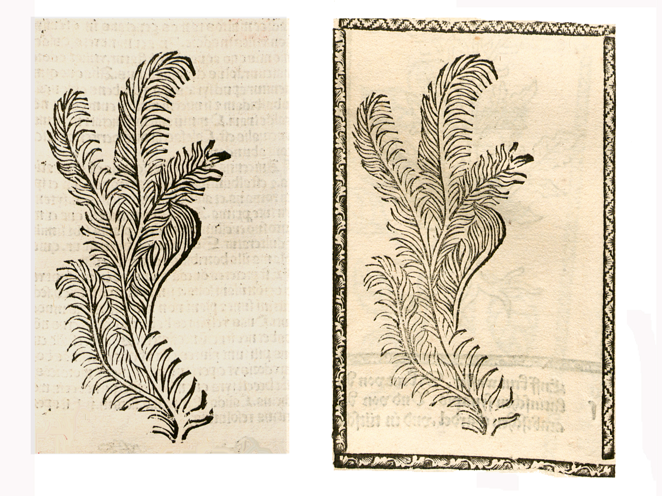 Abbildung vonː Spicanardi (Nardostachys jatamasi)